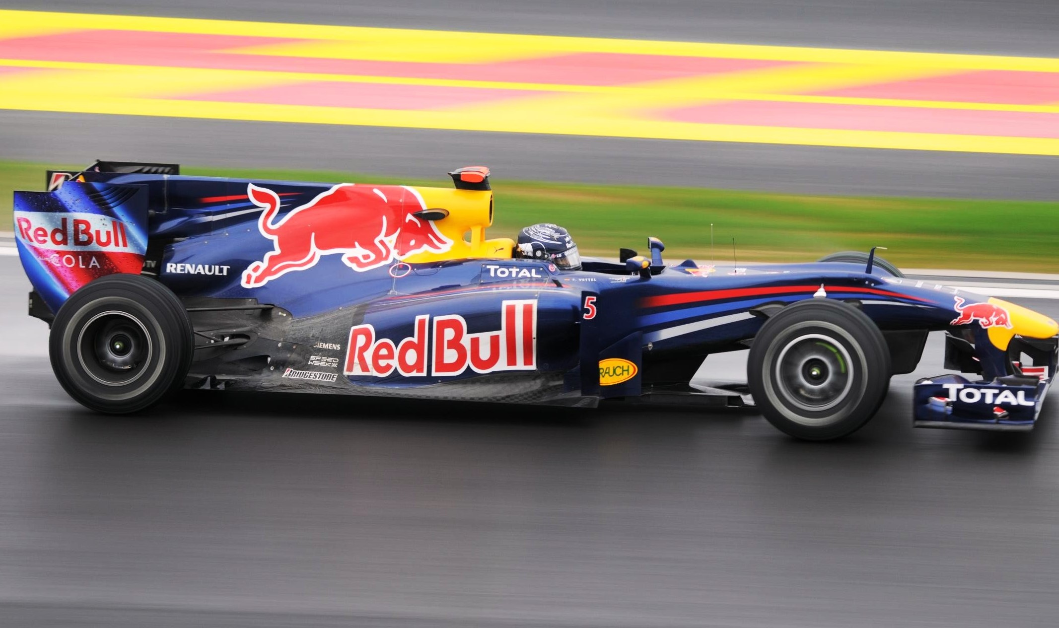 Vettel GP de Corée 2010